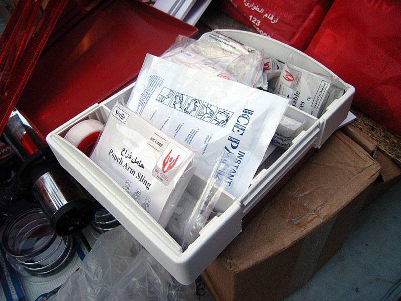 Erste-Hilfe-Kit auf einen Kairoer Basar